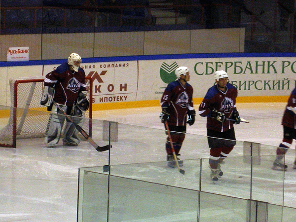 Матч ХК Алтай - ХК Сибирь-2